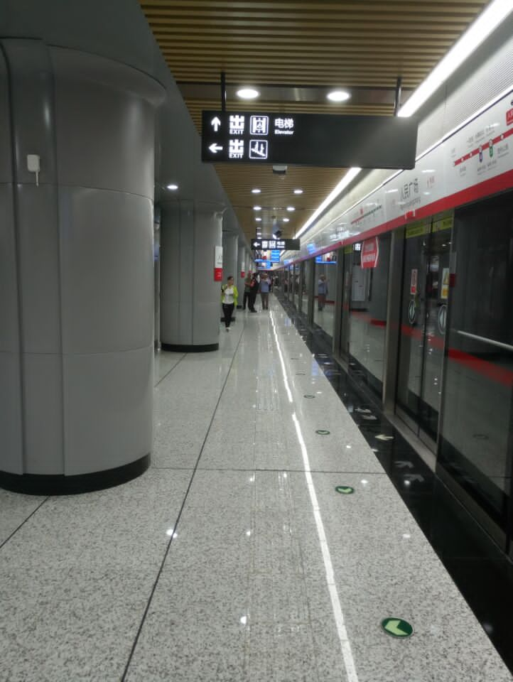 长春人民广场站站台